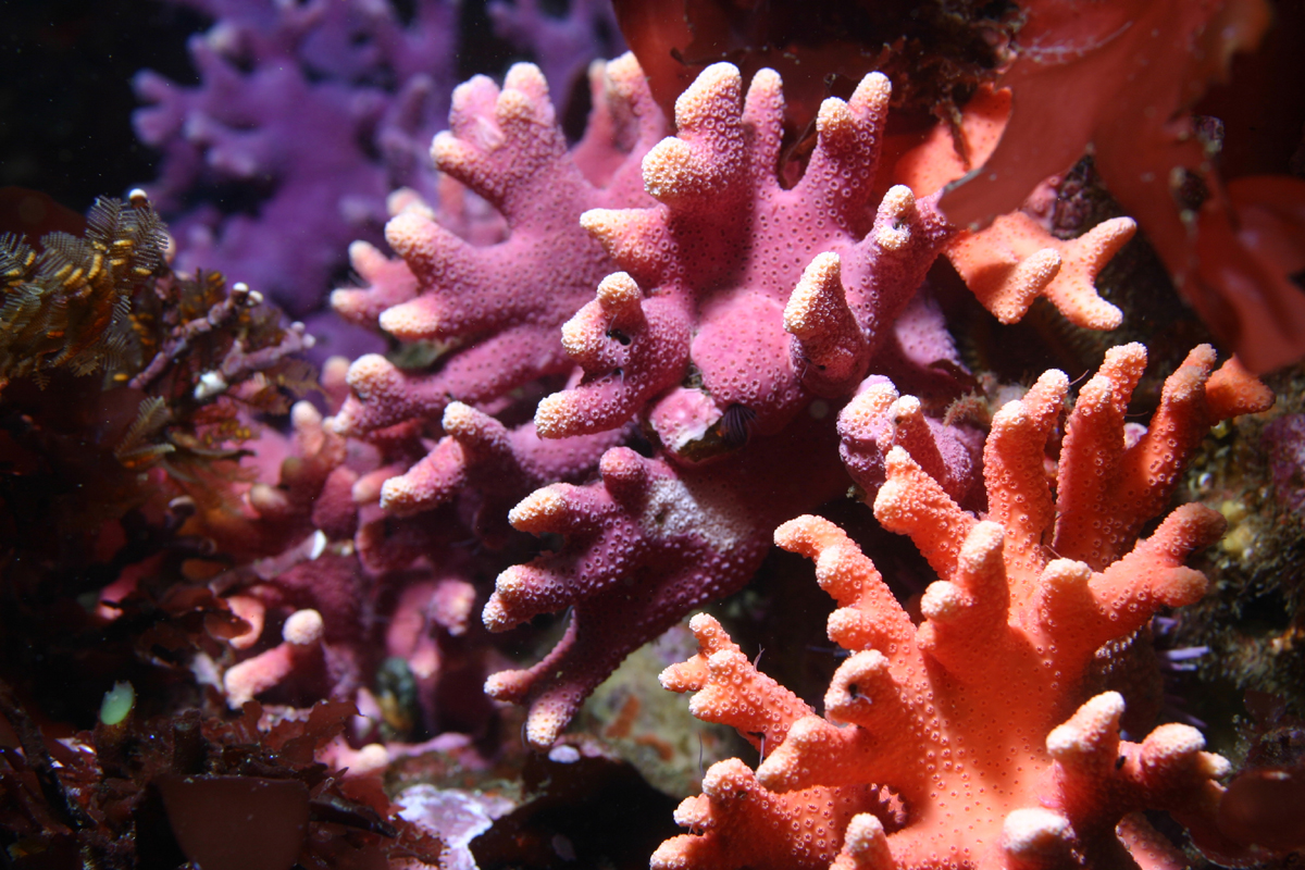 Stylaster californicus, tres colonias con diferente coloración: morada, magenta y salmón. Carmel, California, EE.UU.